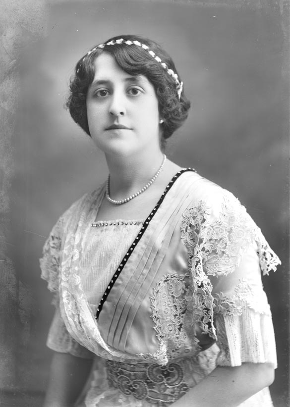 Mercè Llopart (fotografia d'Antoni Esplugas)